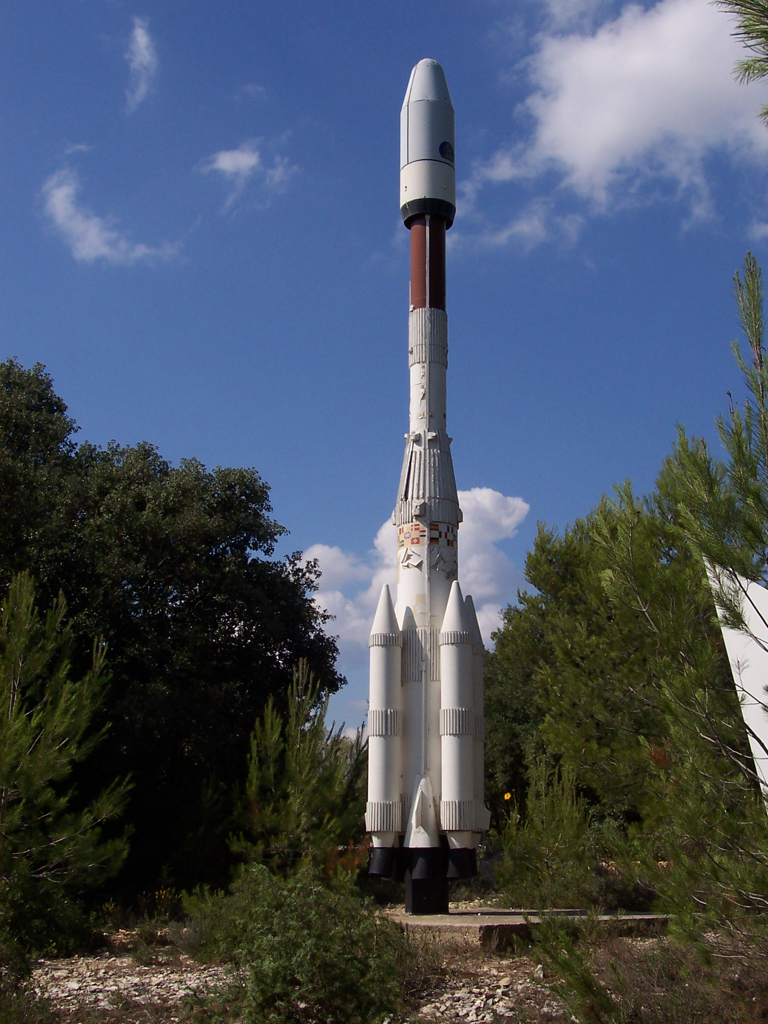 fusée du parc - Parc du Soleil et du Cosmos - Les Angles (Gard)